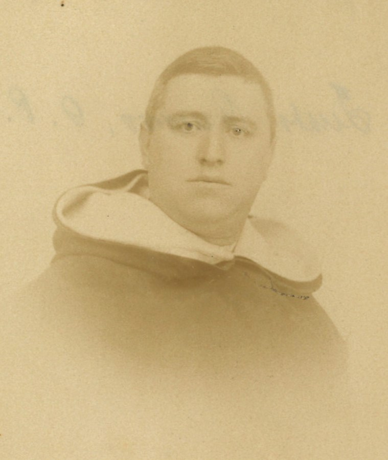 Fotografía de Fr. Justo Cuervo Arango, de la Orden de Predicadores